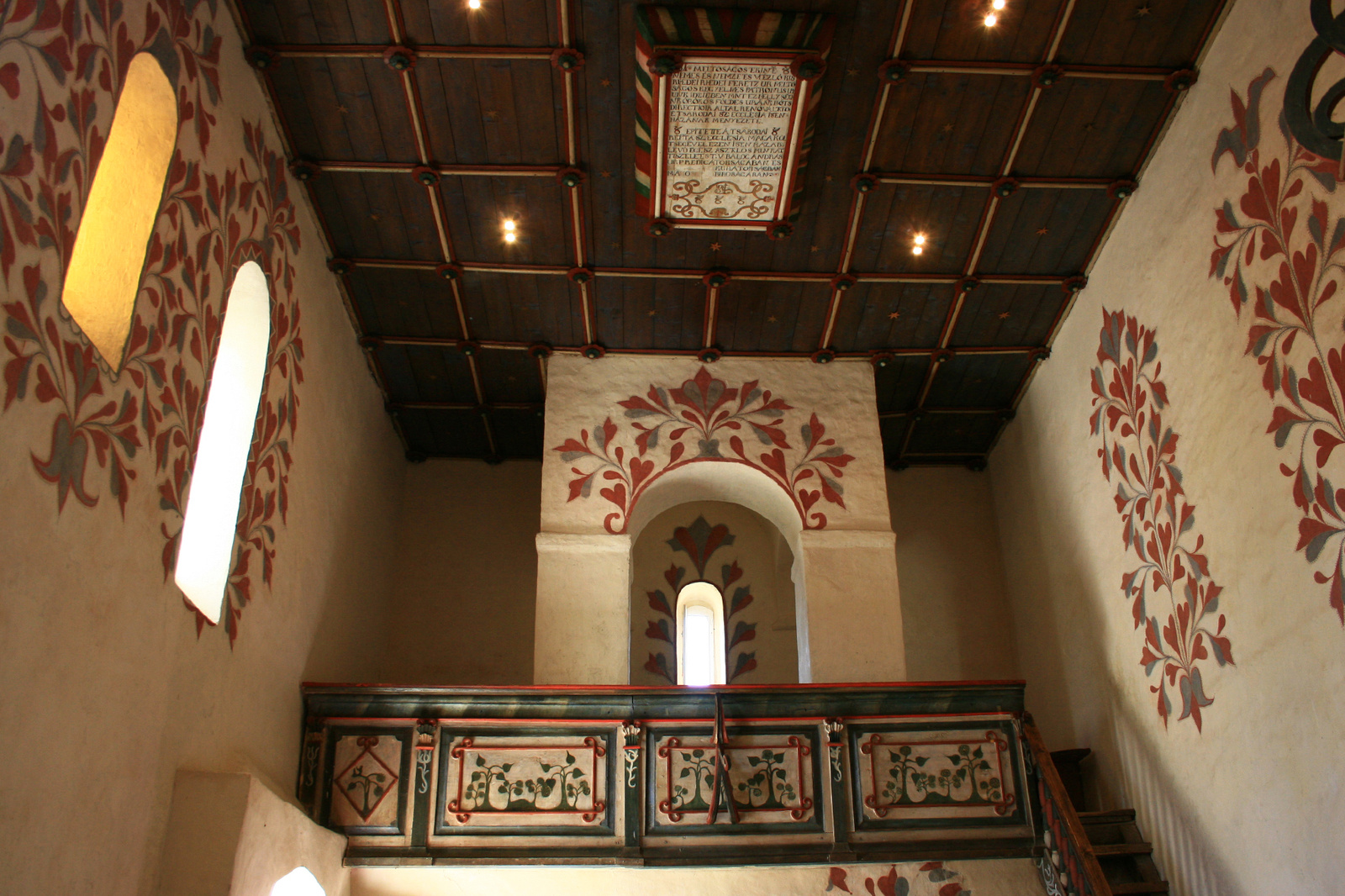 Református templom (Csaroda, Kosuth u.) This is a photo of a monument in Hungary. Identifier: 8205